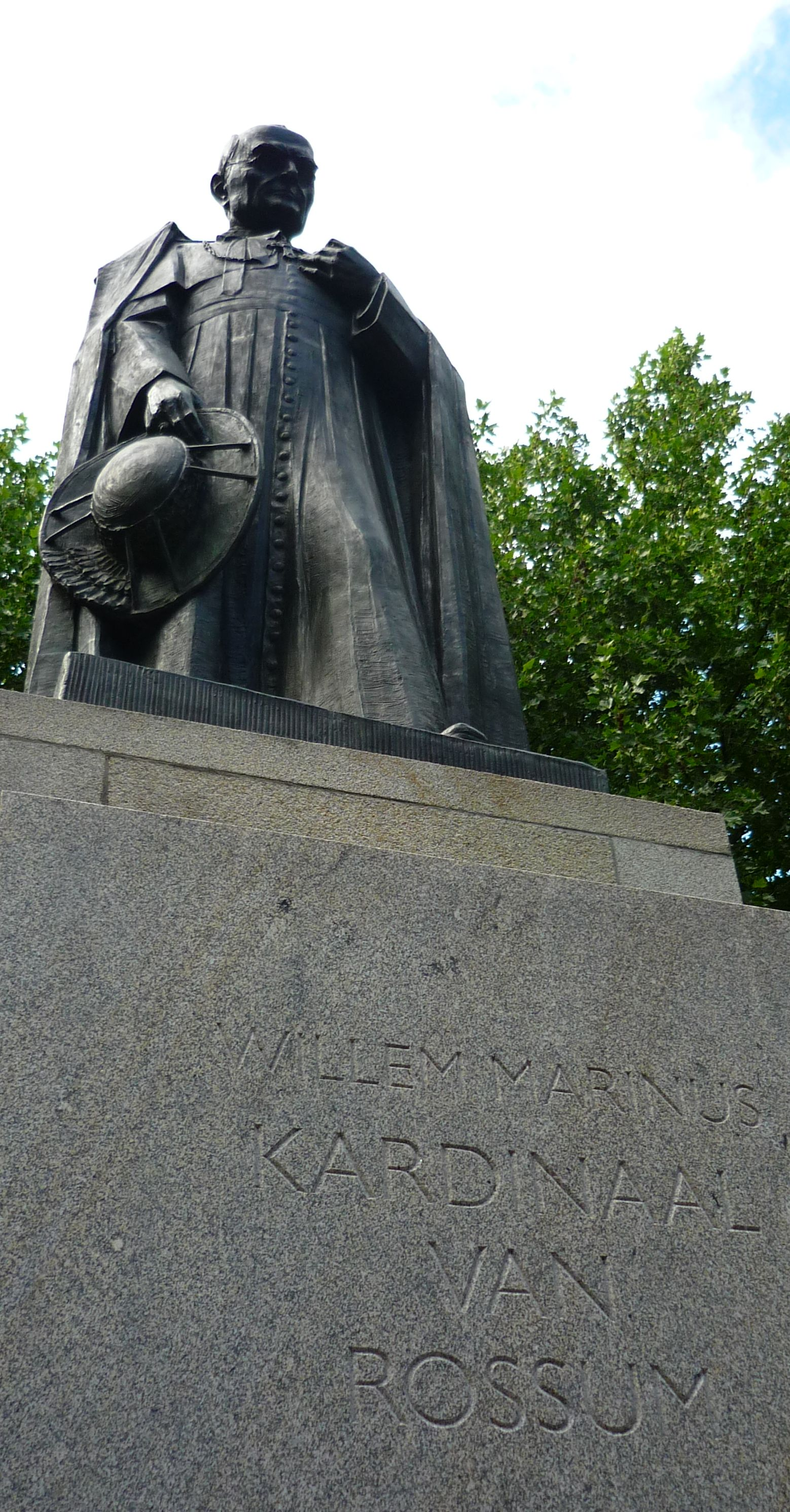 Standbeeld van Willem Marinus Kardinaal van Rossum te Den Bosch.